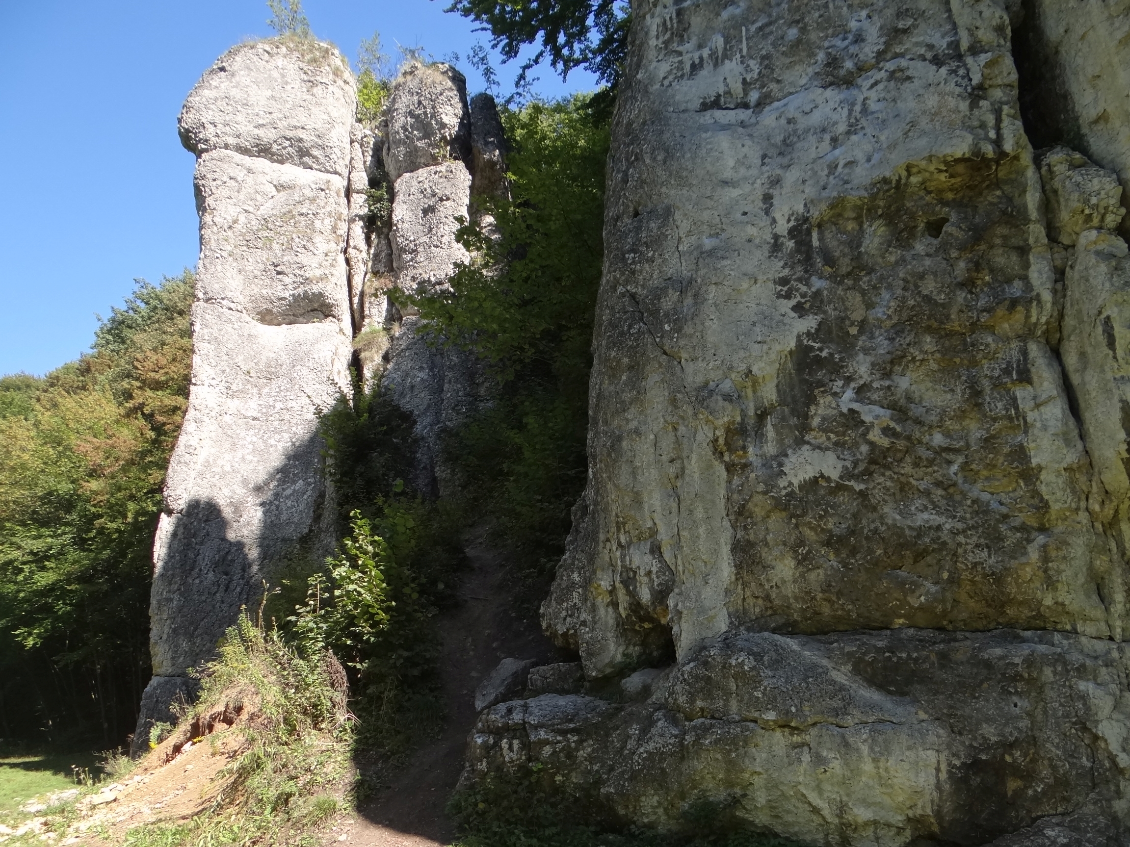 Skała Lipczyńska (po lewej) i Dupa Słonia (po prawej) w Dolinie Będkowskiej